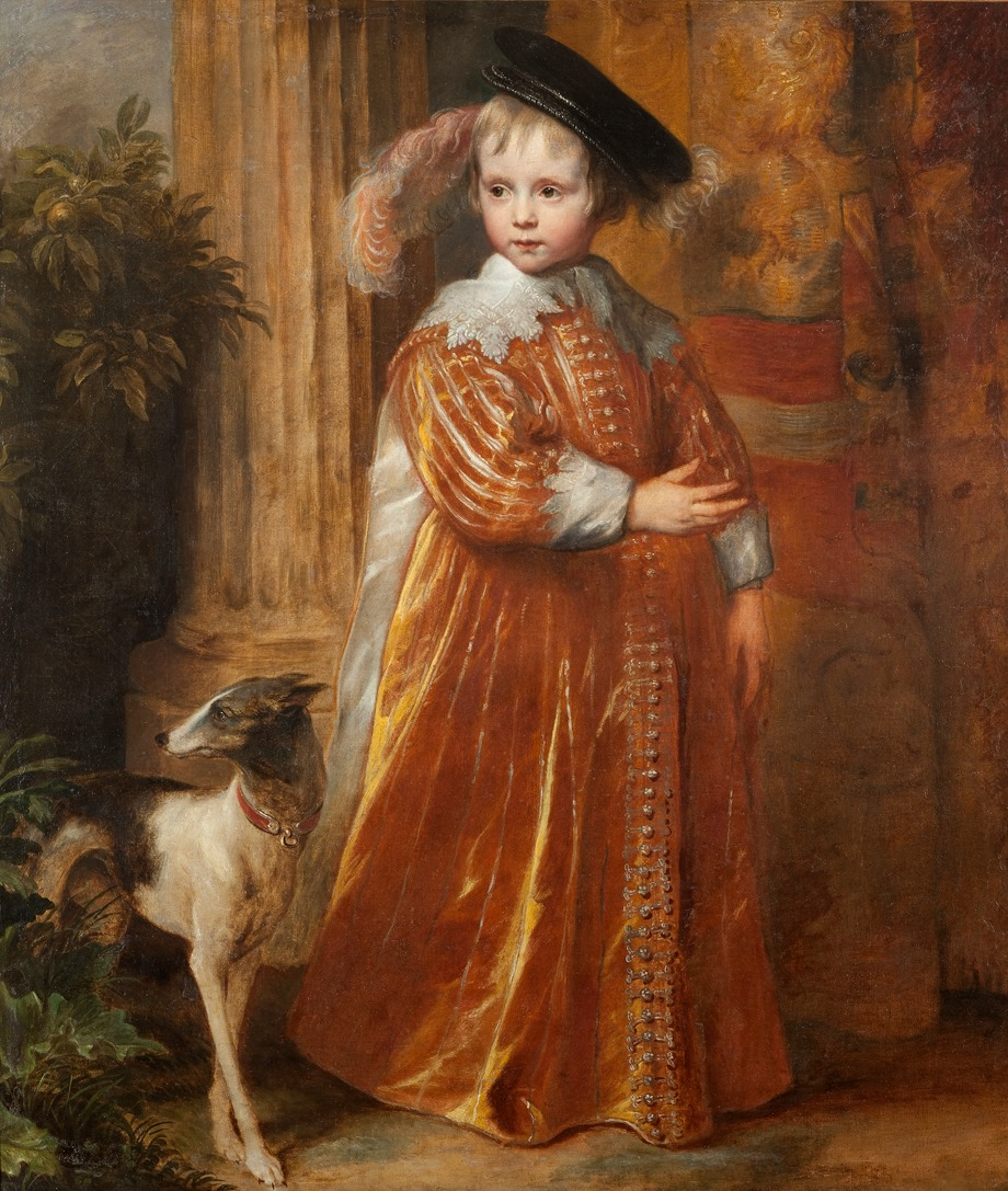 Anton van Dyck, Prinz Wilhelm II. von Nassau-Oranien als Kind mit Windspiel. Öl auf Leinwand, 119 x 105 cm